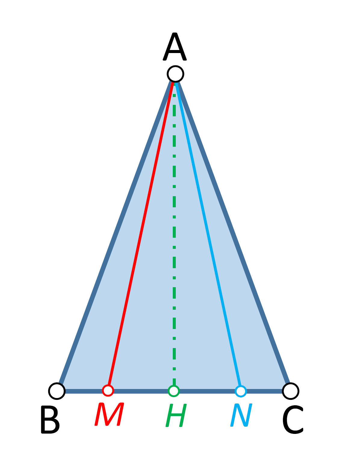 Construcción de dos líneas isogonales (AM y AN) sobre un triángulo isósceles